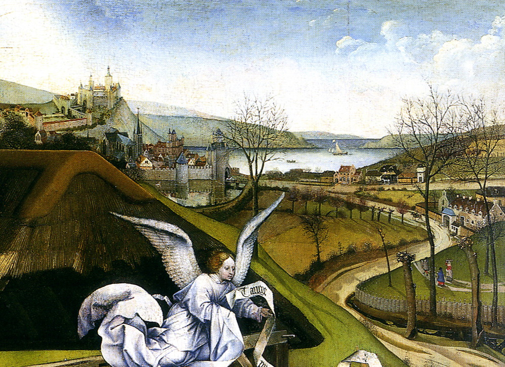 detail: Landscape